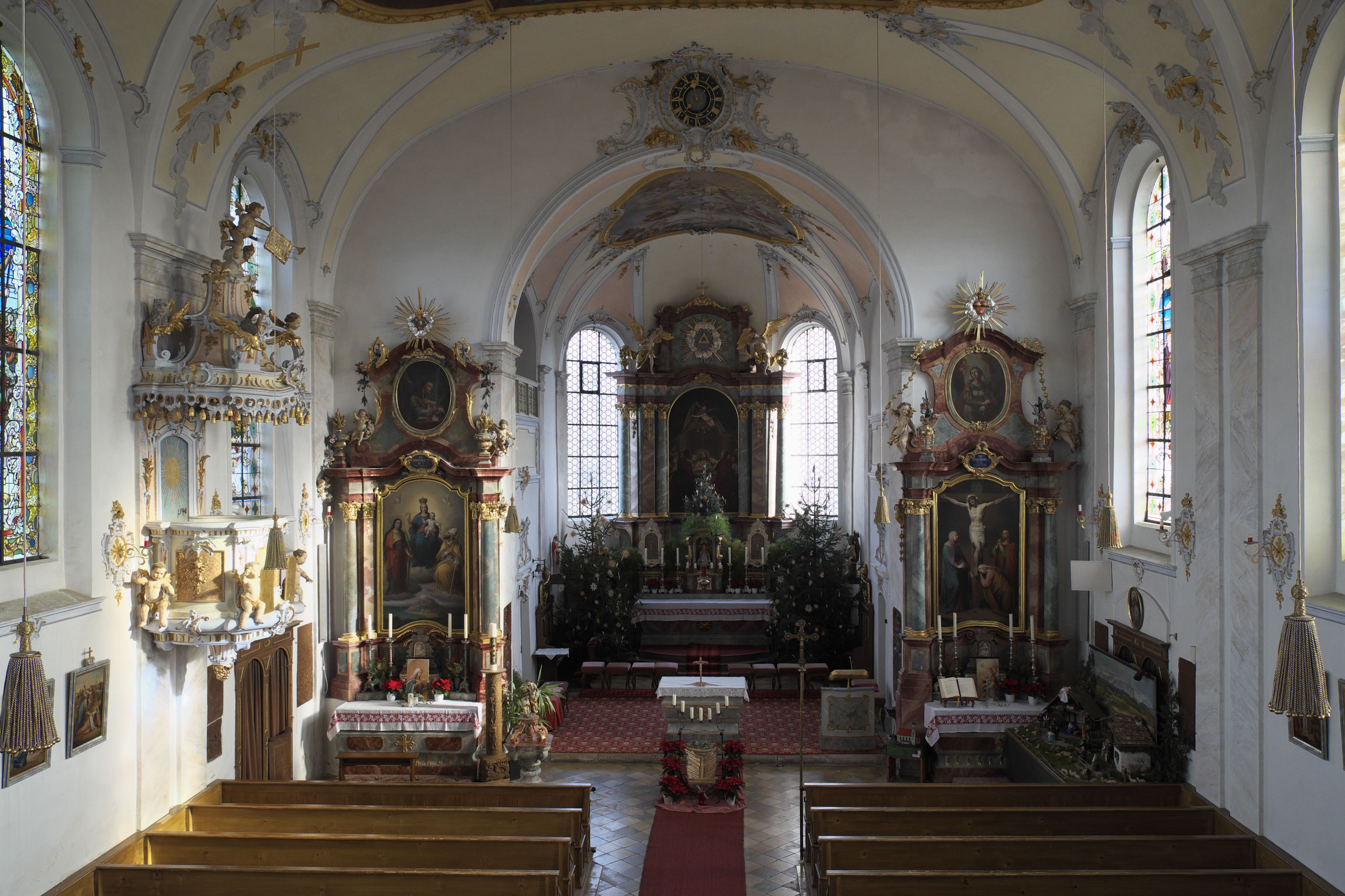 Katholische Pfarrkirche St. Laurentius in Pähl im Landkreis Weilheim-Schongau (Bayern/Deutschland), Innenraum